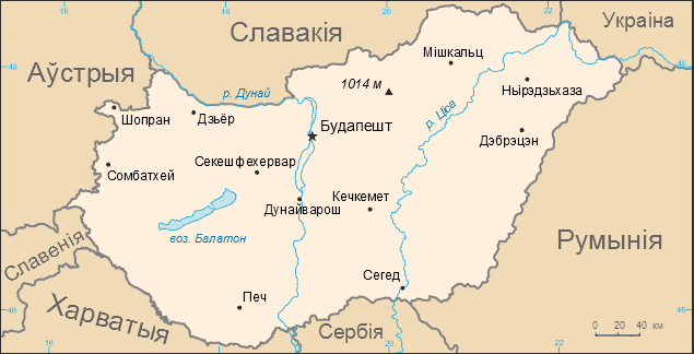 Карта ВенгрыіБеларуская (тарашкевіца): Мапа Вугоршчыны